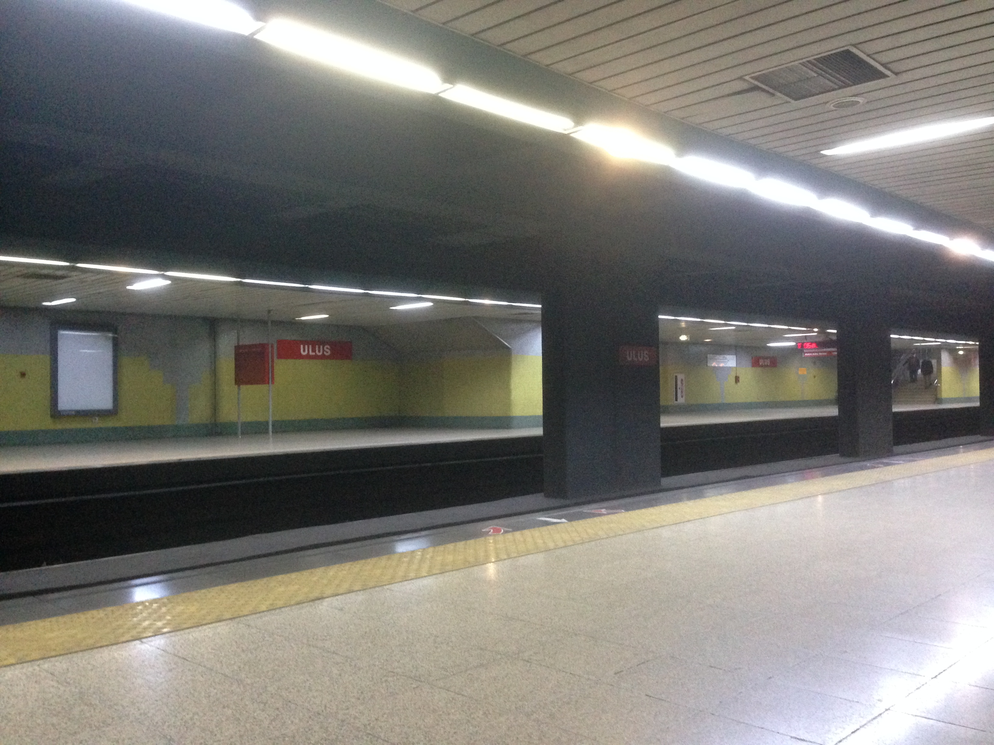 Batıkent metrosundan bir görüntü